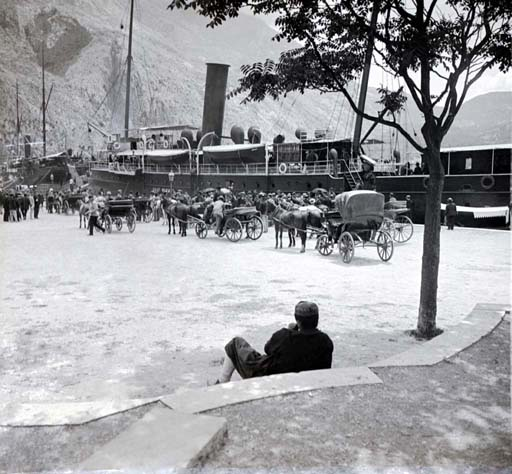 přístav parníků (Kotor)